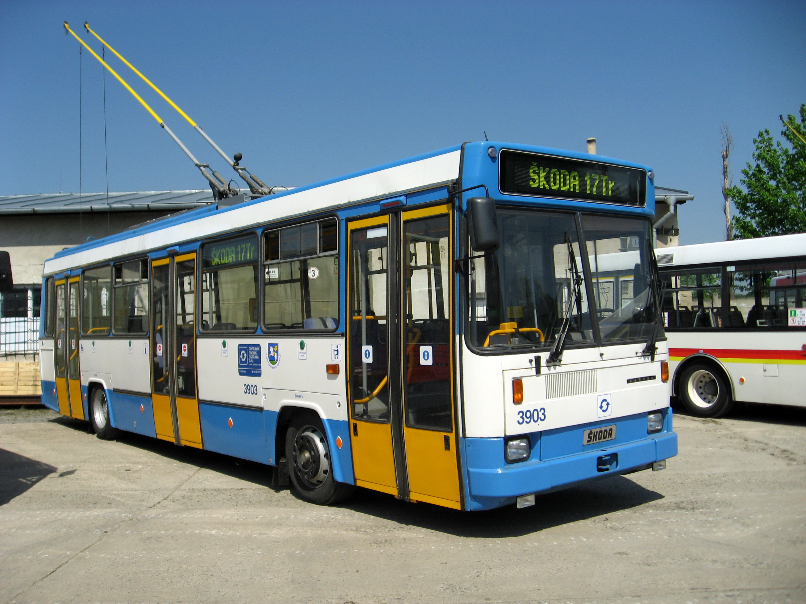 Trolejbus Škoda 17Tr v Řečkovicích